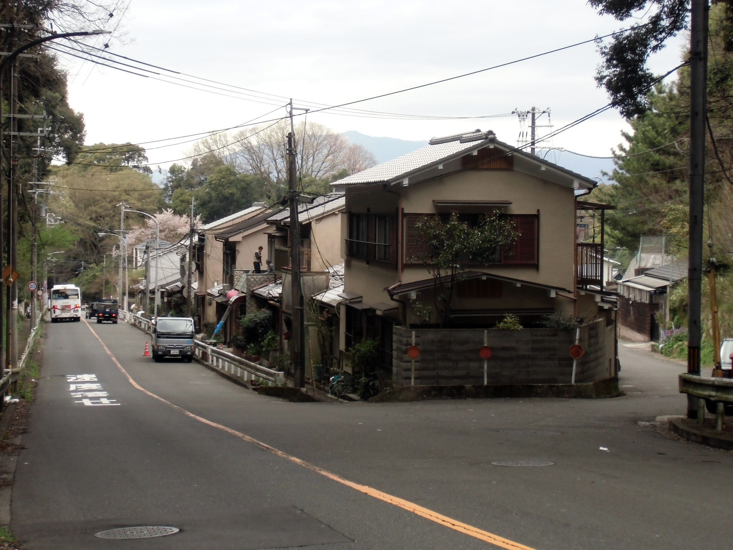 京都府道116号渋谷山科停車場線（左）と渋谷街道（右）